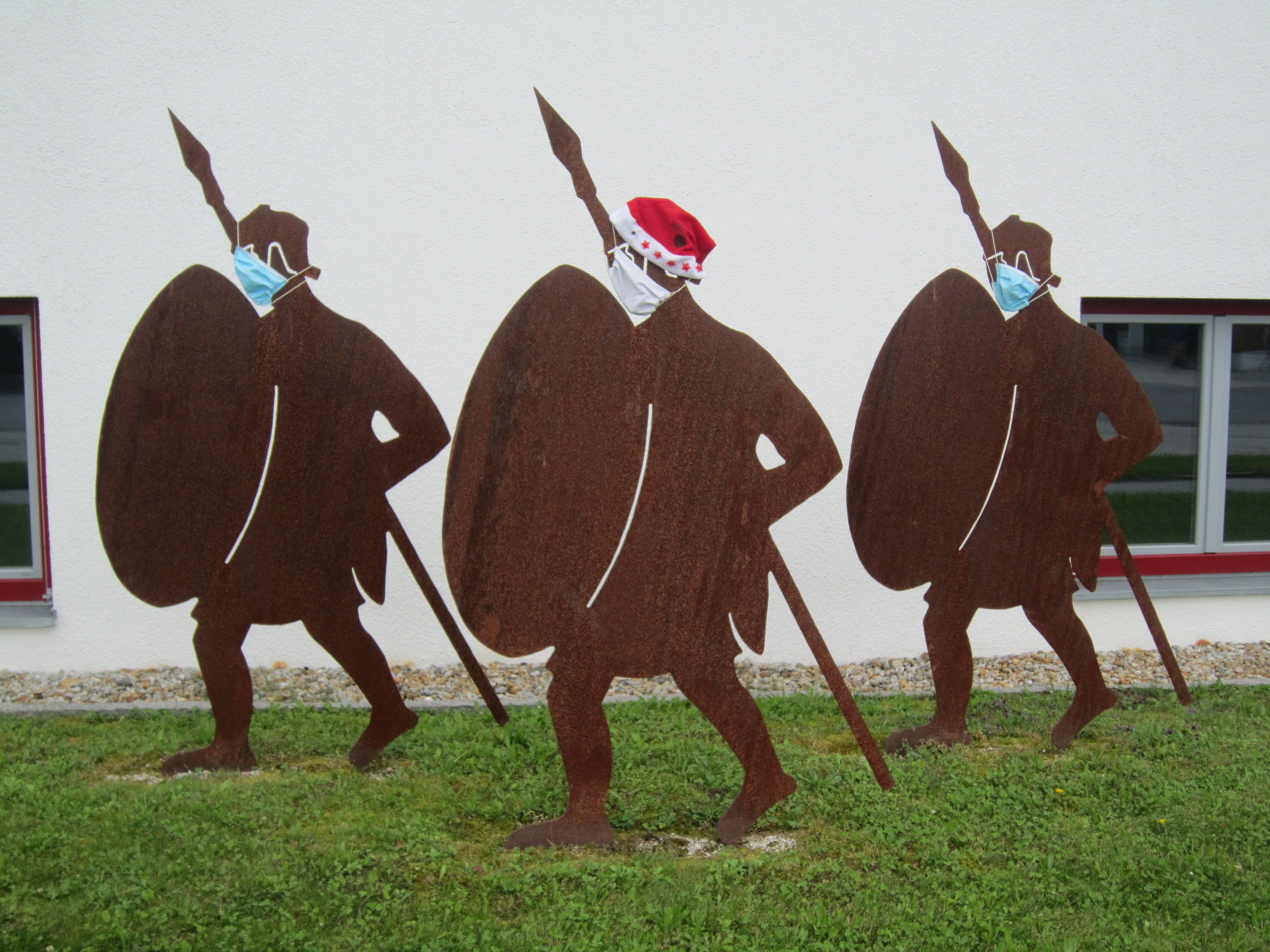 Kreative Verfremdung der eisernen Legionärsskulptur am Fahnenheiligtum auf dem Gelände des ehemaligen Kastells Künzing im COVID-19-Sommer 2020